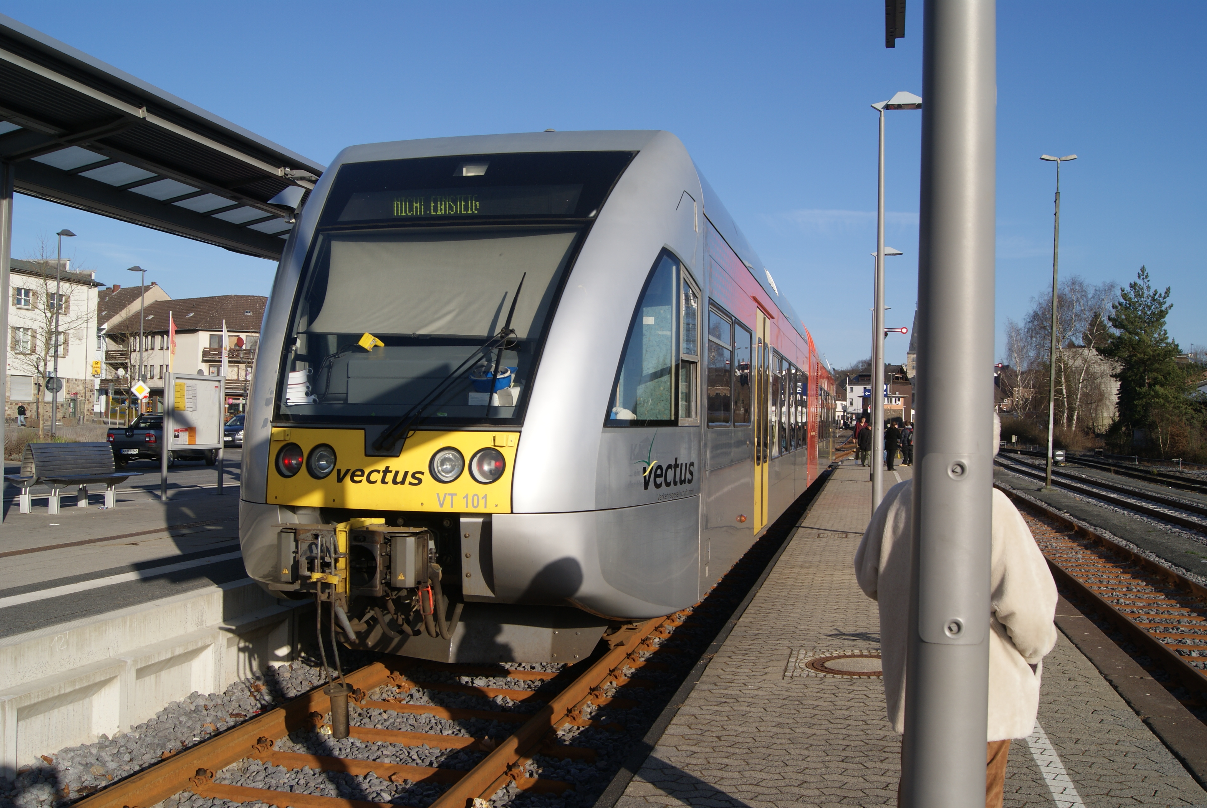 Stadler Gtw 2/6 von vectus im Einsatz auf der Oberwesterwaldbahn (RB28) beim Zwischenhalt im Bahnhof Altenkirchen (Westerwald). Das Fahrzeug stammt ursprünglich von der Hessischen Landesbahn, ist aber bereits seit Betriebsaufnahme beim vectus im Einsatz.